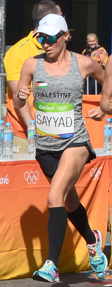 Passage du marathon des jeux olympiques de Rio 2016 dans le centre de Rio